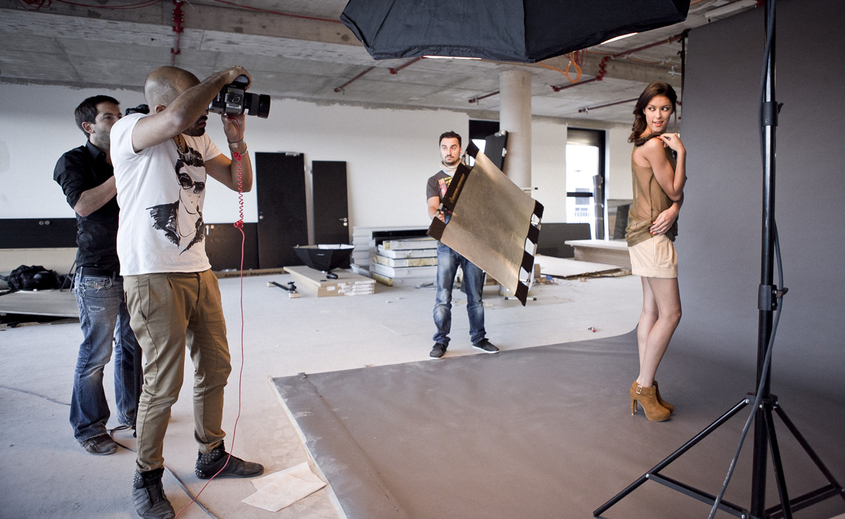 Fotoshooting Rebecca Mir und Alexander Palacios in Frankfurt am Main. Outfit ESCADA SPORT SS 2012